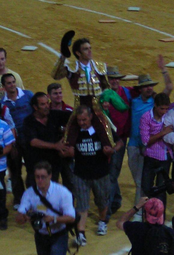 El diestro José Tomás a hombros en la Plaza de toros de Granada (Feria del Corpus 2009)